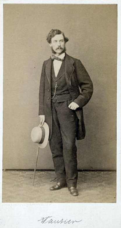 Fotografie von Benjamin Vautier, Arnold Overbeck, Gebr. G. & A. Overbeck in Düsseldorf